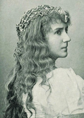 Louise Dumont als Portia in Shakespeares Der Kaufmann von Venedig